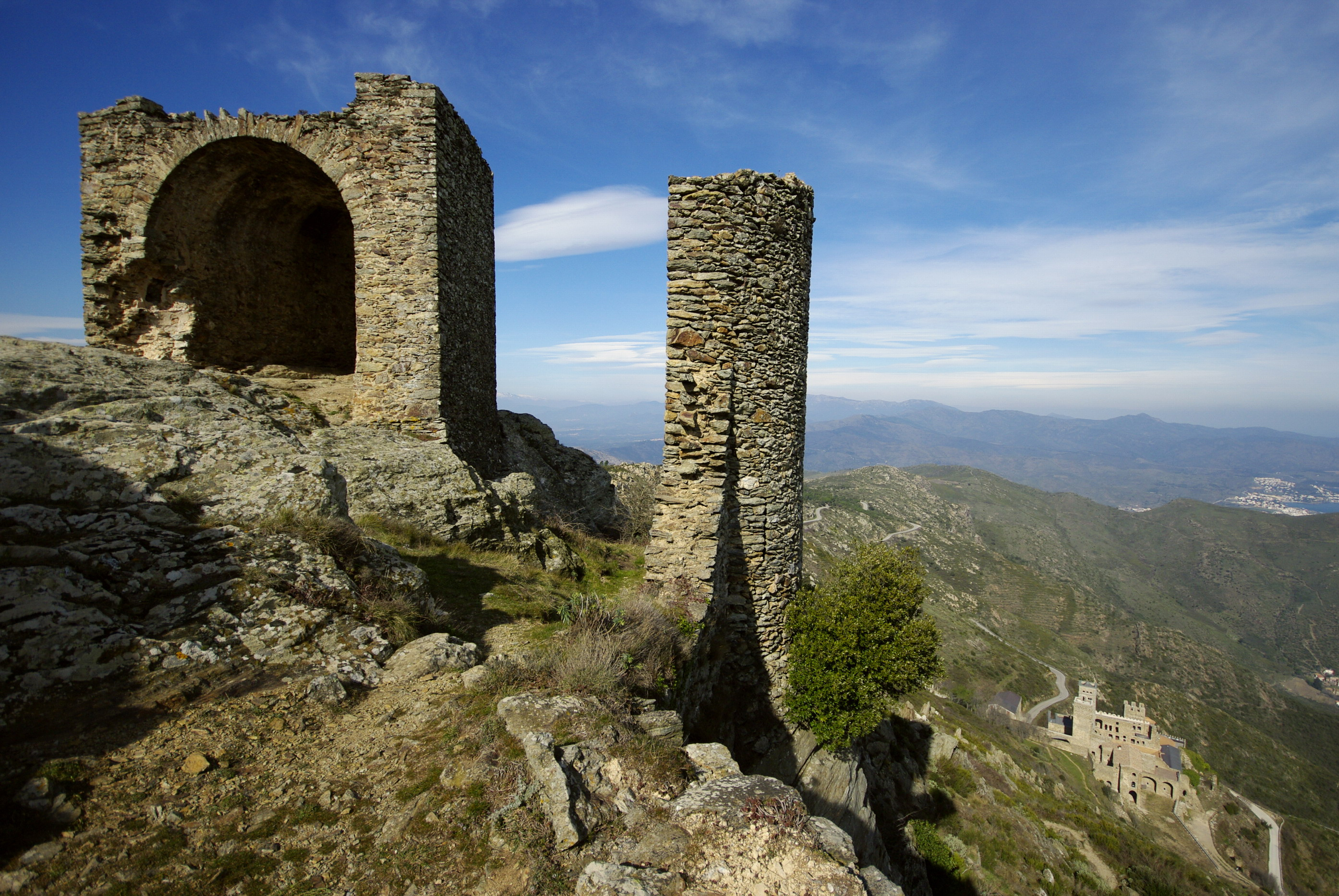 Castell de Verdera (El Port de la Selva). Al peu, a la dreta, el monestir de Sant Pere de Rodes.